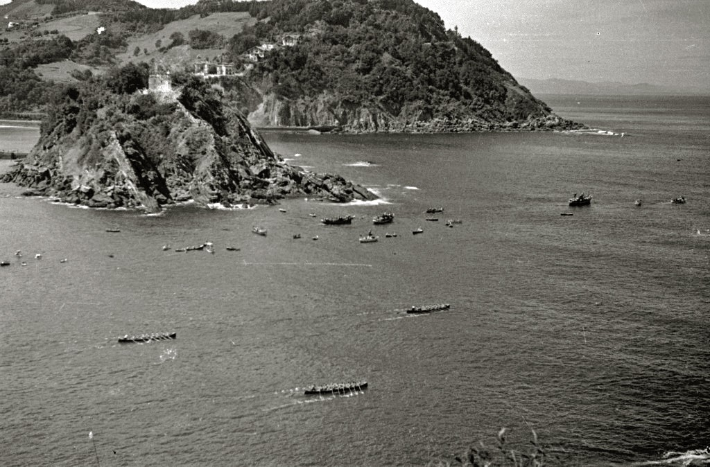 Título original: Regatas de traineras en la bahía de la Concha (114/127) Localización: San Sebastián (Guipúzcoa)